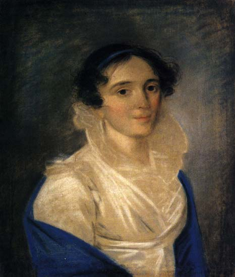 Екатерина Гавриловна Рубанова (1794-1828), дочь поэта Г. П. Каменева, жена И. И. Рубанова.